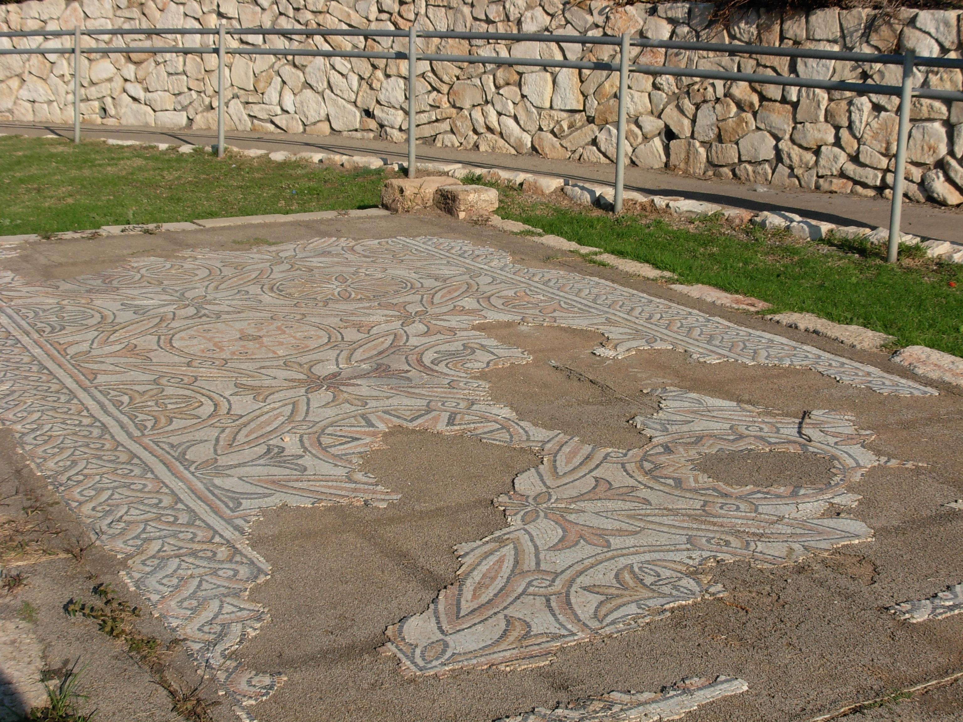 Psifas Tel Shikmona פסיפס תל שקמונה